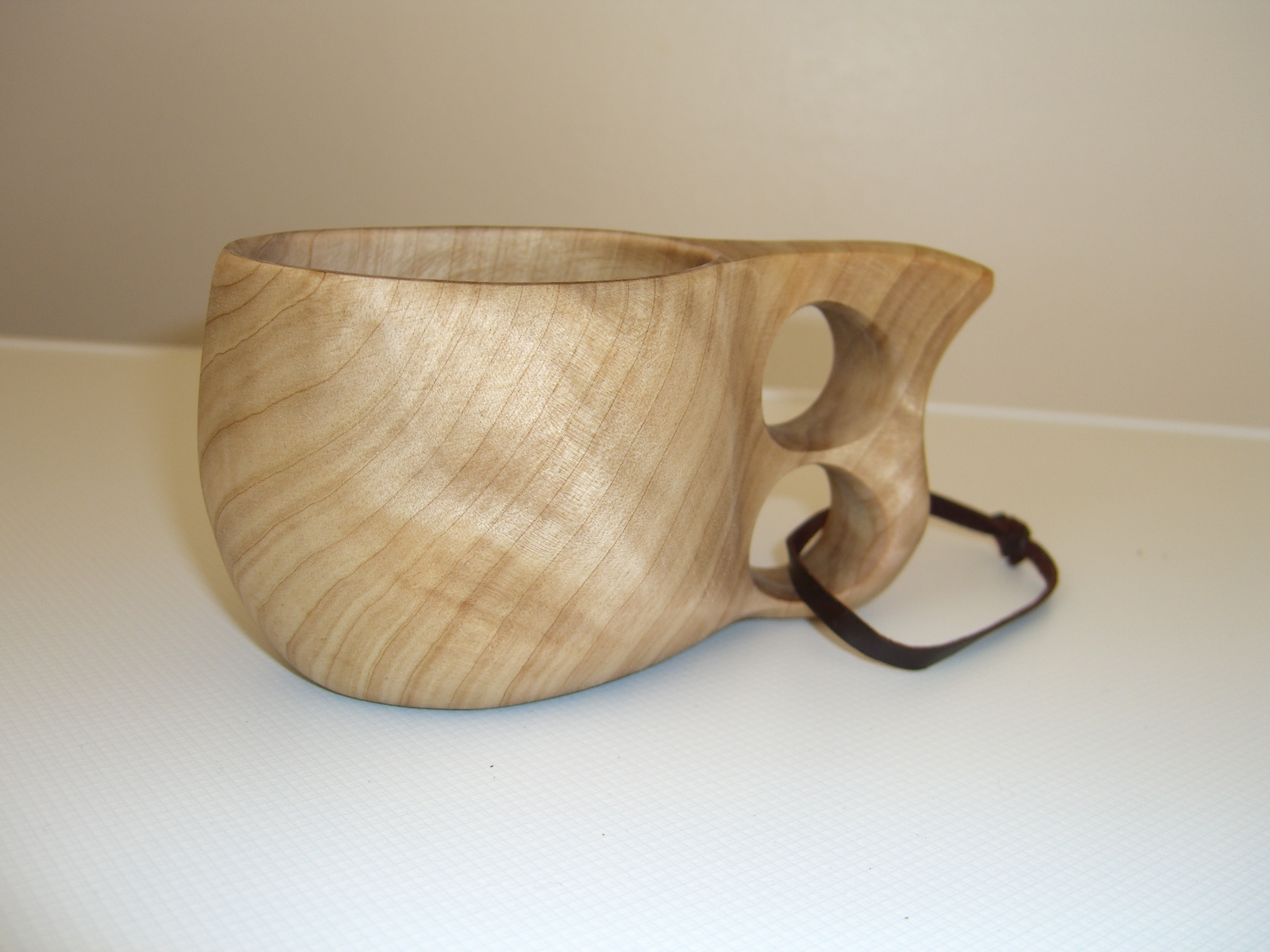 Pahkasta valmistettu kuksa.